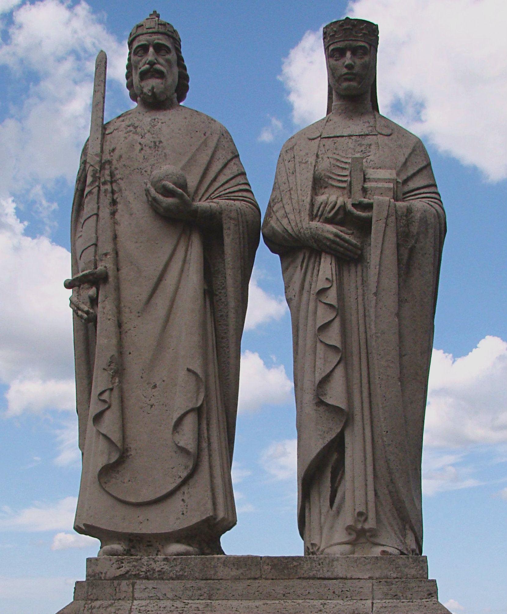 Szent István király és felesége, Bajor Gizella szobra Veszprémben, a Vár utca végén.